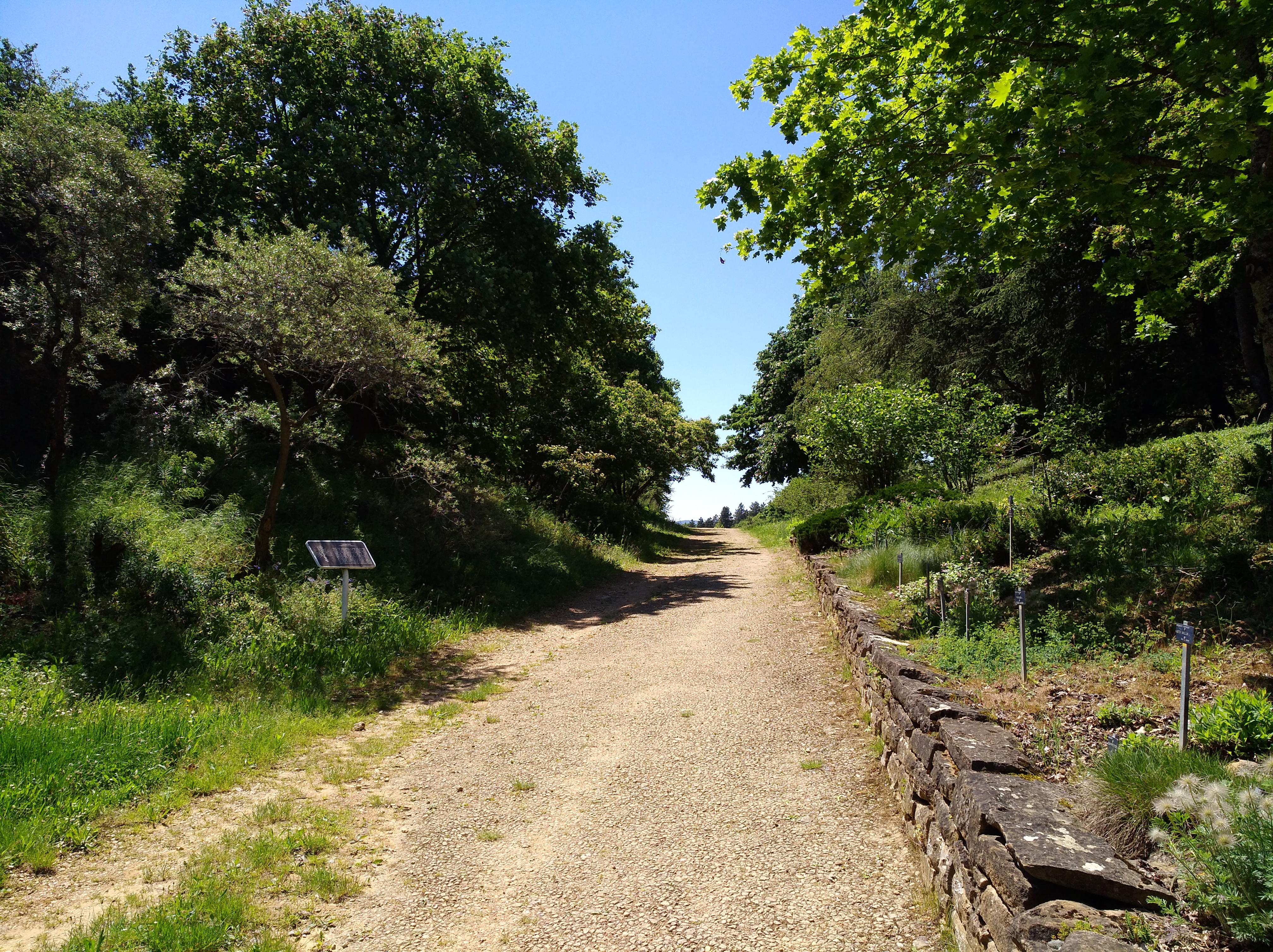 Chemin du jardin botanique de l'Espace Pierres Folles, à Saint-Jean-des-Vignes (Rhône, France).